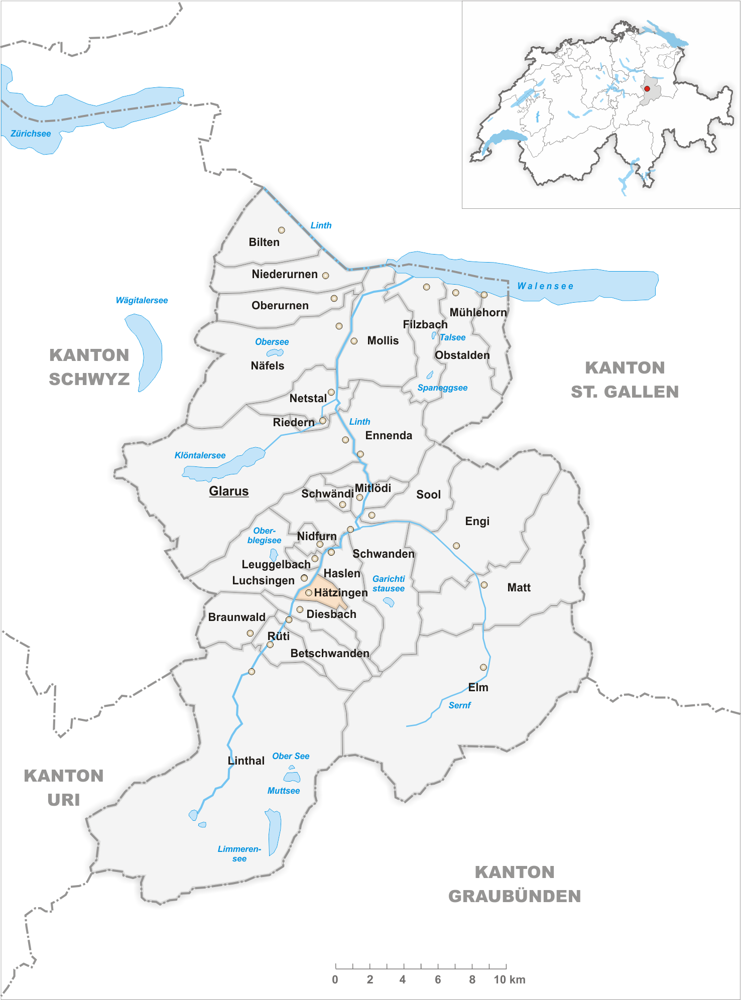 Municipality Hätzingen Artist: Tschubby